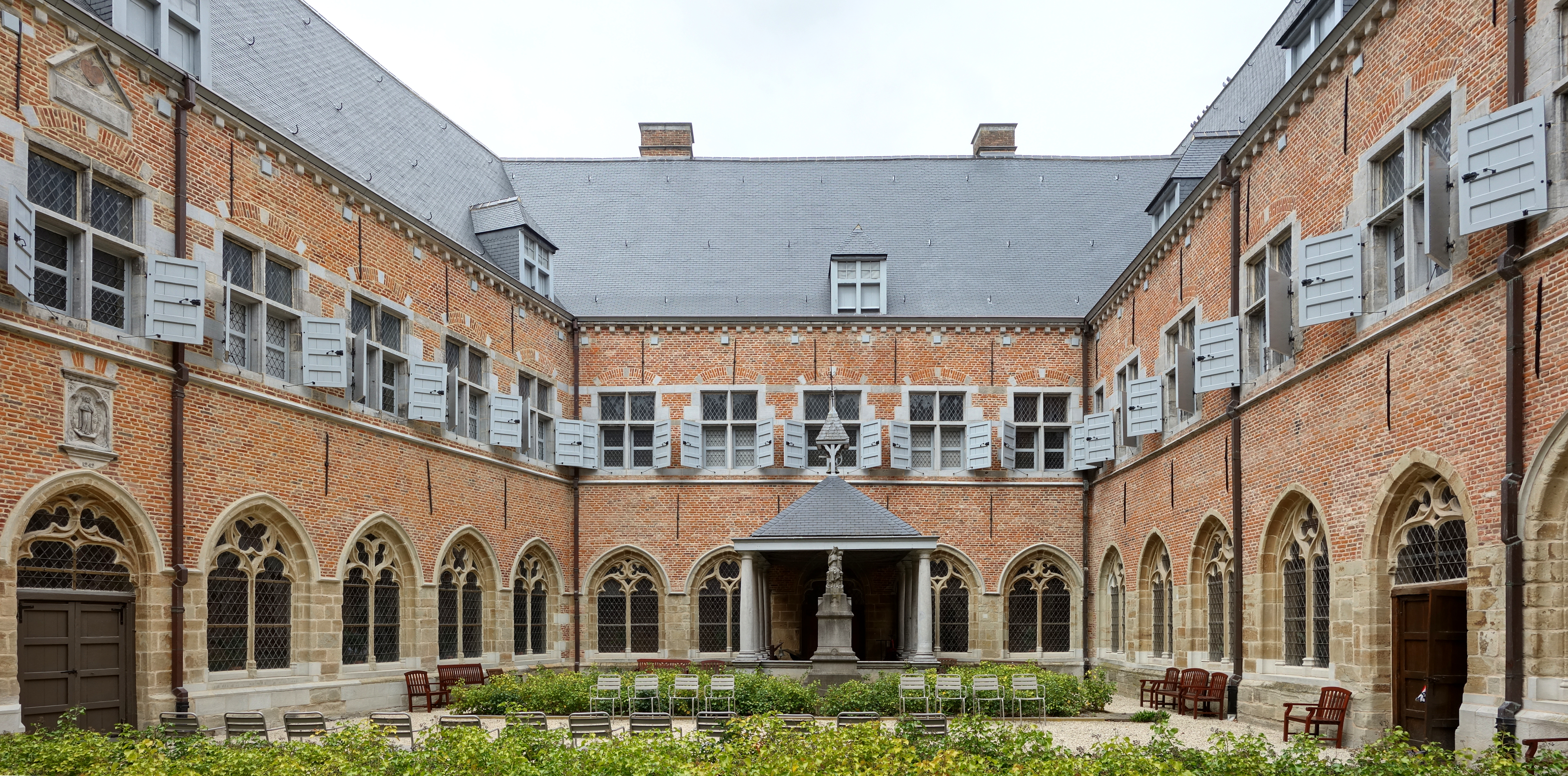 Le cloitre de l'Hôpital Notre-Dame à la Rose de Lessines.